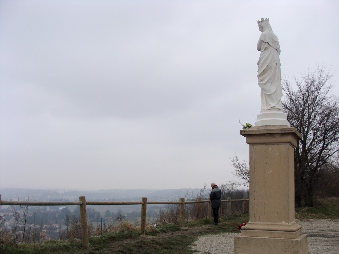 Le belvédère de la madone de Fleurieu.